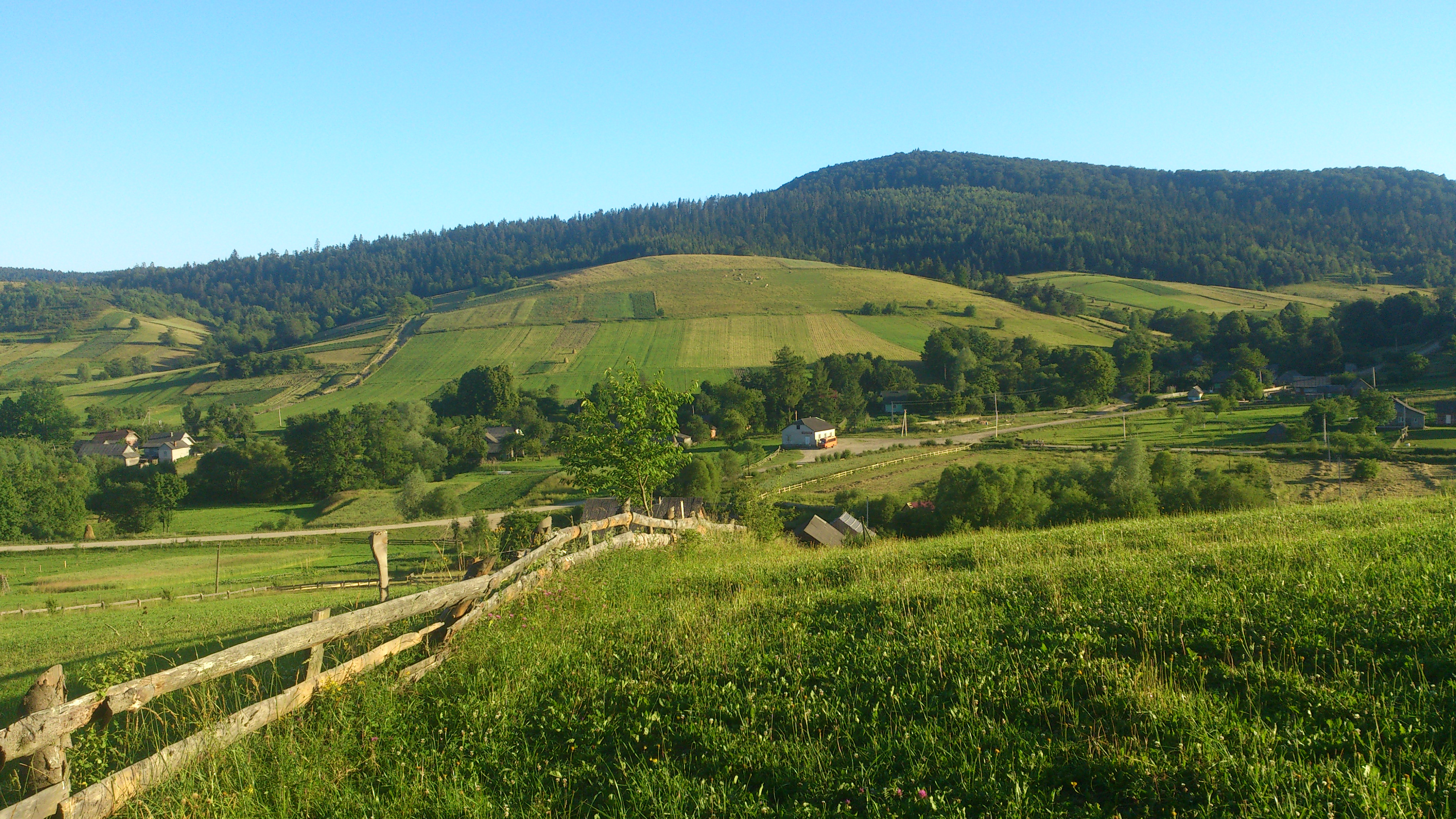 На фото зображена панорама села Тиха